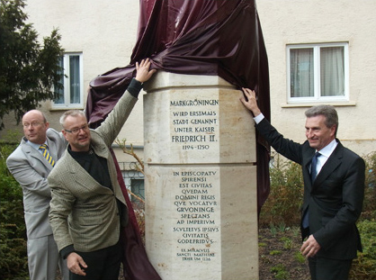 EU-Kommissar Günther Oettinger (rechts) weiht am 21. April 2012 die Stauferstele in Markgröningen ein. Dabei Markgröninges Bürgermeister Kürner (ganz links) und der Bildhauer der Stauferstelen, Markus Wolf.